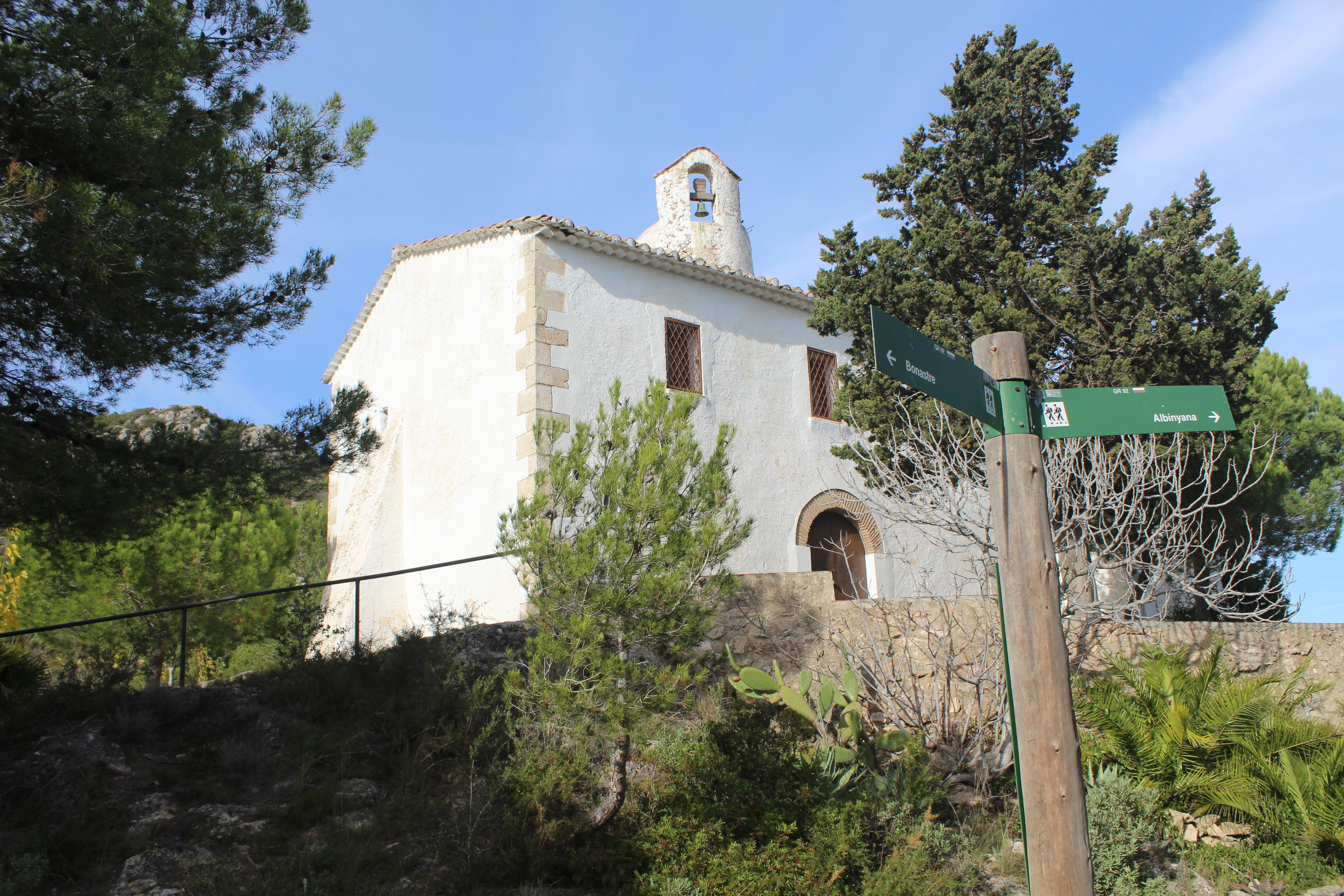 L'ermita de Sant Antoni, Albinyana, Tarragona.